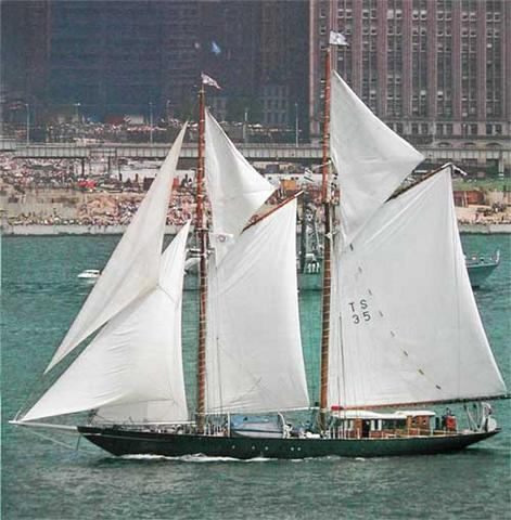 Taken 4-JUL-1976, NYC.